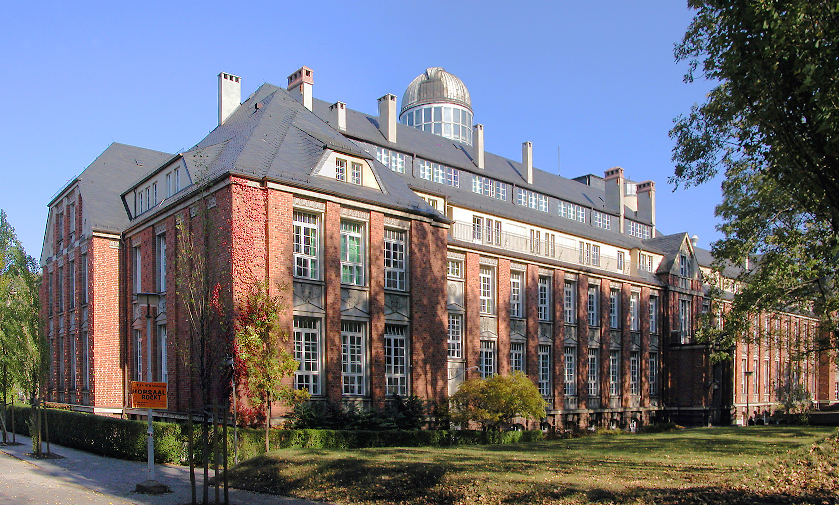 18.10.2003 01069 Dresden-Südvorstadt, George-Bähr-Straße 1 (GMP: 51.029752,13.729214): Beyer-Bau der TU Dresden. 1910-1913 nach Plänen des Architekten Martin Dülfer erbaut und 1953 nach dem Bauingenieur Kurt Beyer benannt. Landmarke ist der 40 m hohe Turm des Lohrmann-Observatoriums Ansicht von Süden. [DSCN]20031018600MDR.JPG(c)Blobelt